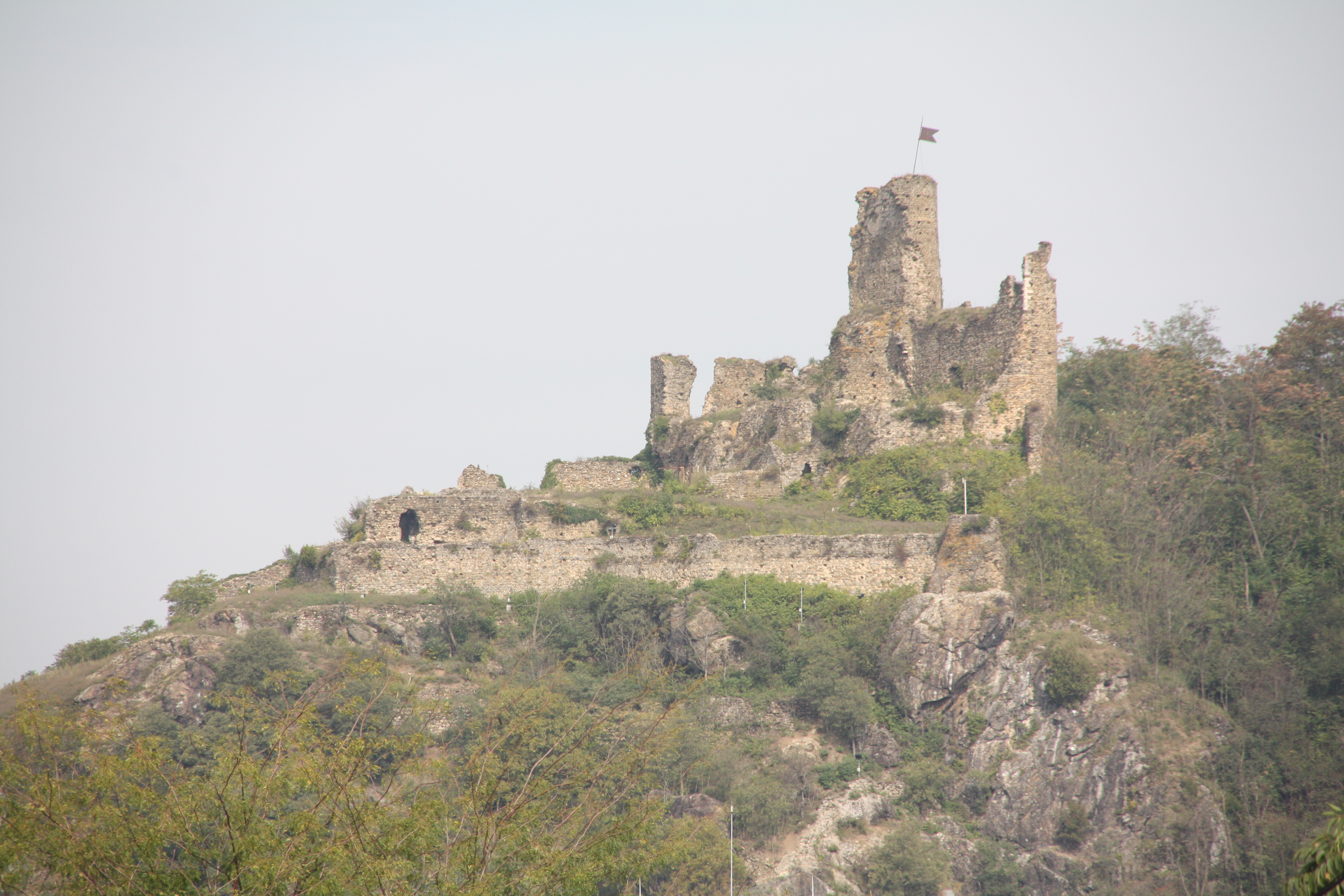 Le Château de la Bâtie à Vienne, Isère, France .